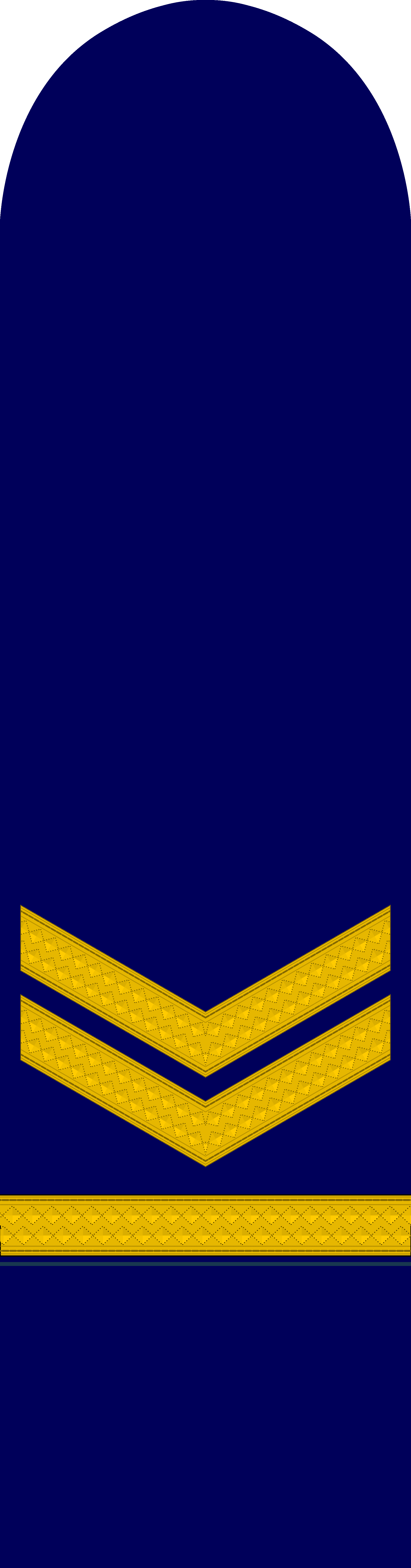 Rangabzeichen der DDR Volksmarine bis 1990, hier Ärmelstreifen für «Spieß/Hauptbootsmann» (vergleichbar mit Spieß/Kompaniefeldwebel'‘ der Deutschen Bundeswehr) Der einfache Ärmelstreifen (im Soldaten-jargon auch Kolbenring) wurden an beiden Unterärmeln von Uniformjacke und Mantel getragen. Als Spieß kamen traditionell die ranghöchsten Berufsunteroffiziere der jeweiligen Einheit, später auch Fähnriche, zum Einsatz.